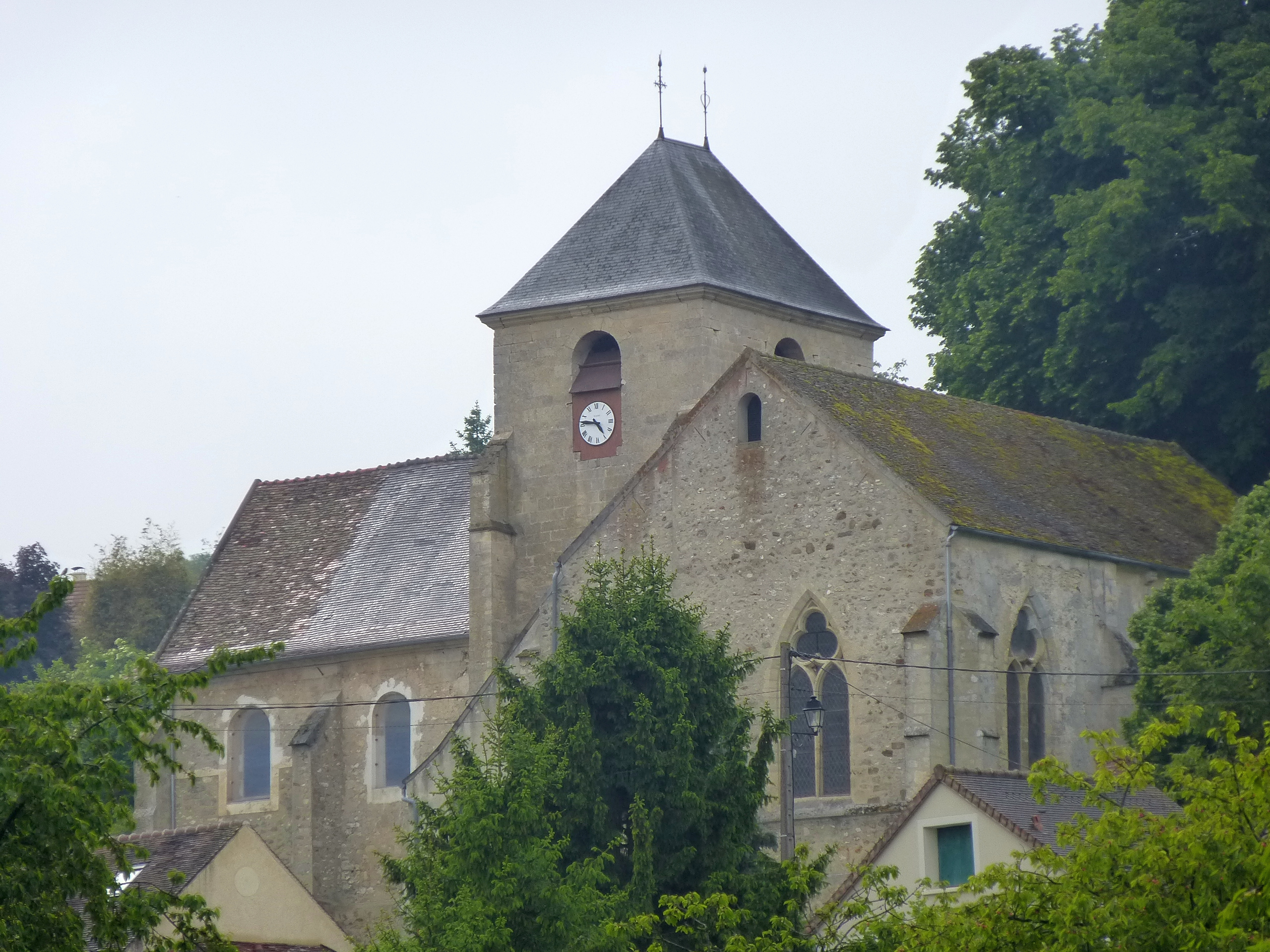 Église Sainte-Aulde de Sainte-Aulde. (département de la Seine-et-Marne, région Île-de-France).